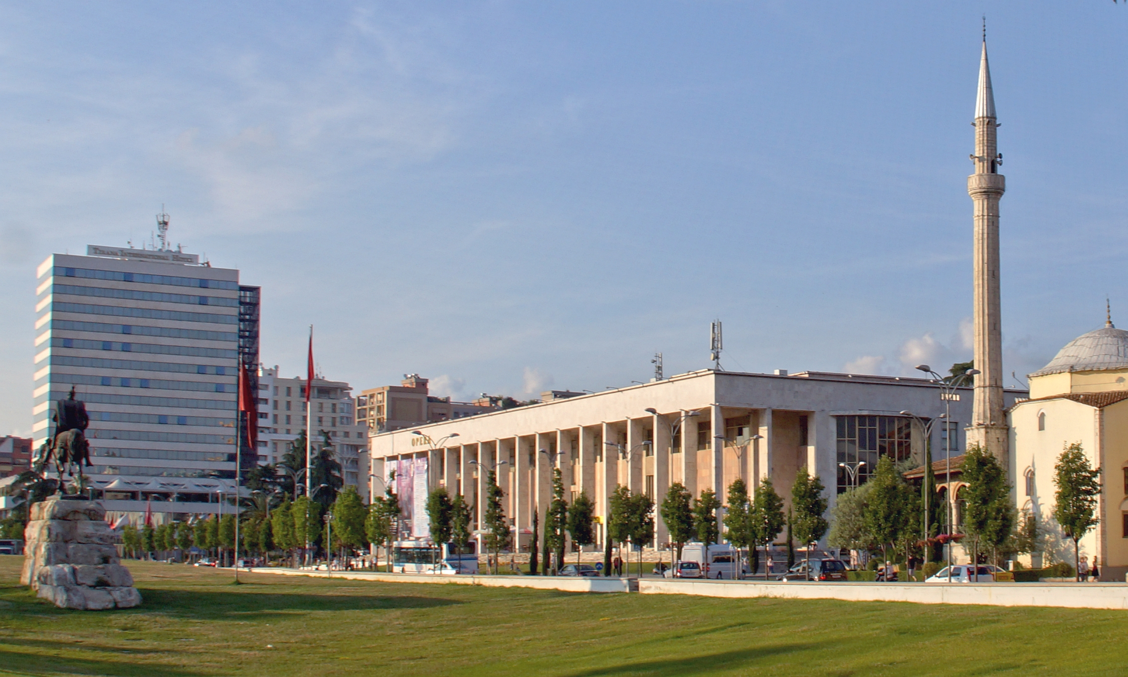 Nationalbibliothek von Albanien im Kulturzentrum am Skanderbeg-Platz in Tirana - Reiterstandbild Fürst Skanderbeg (errichtet 1968) - Et’hem-Bey-Moschee - Foto Wolfgang Pehlemann DSC05905